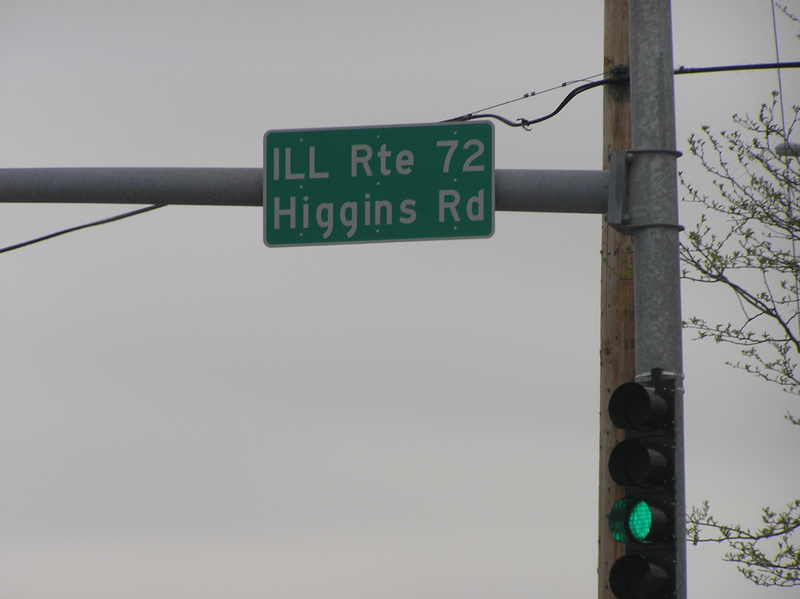 ILL 72 route sign